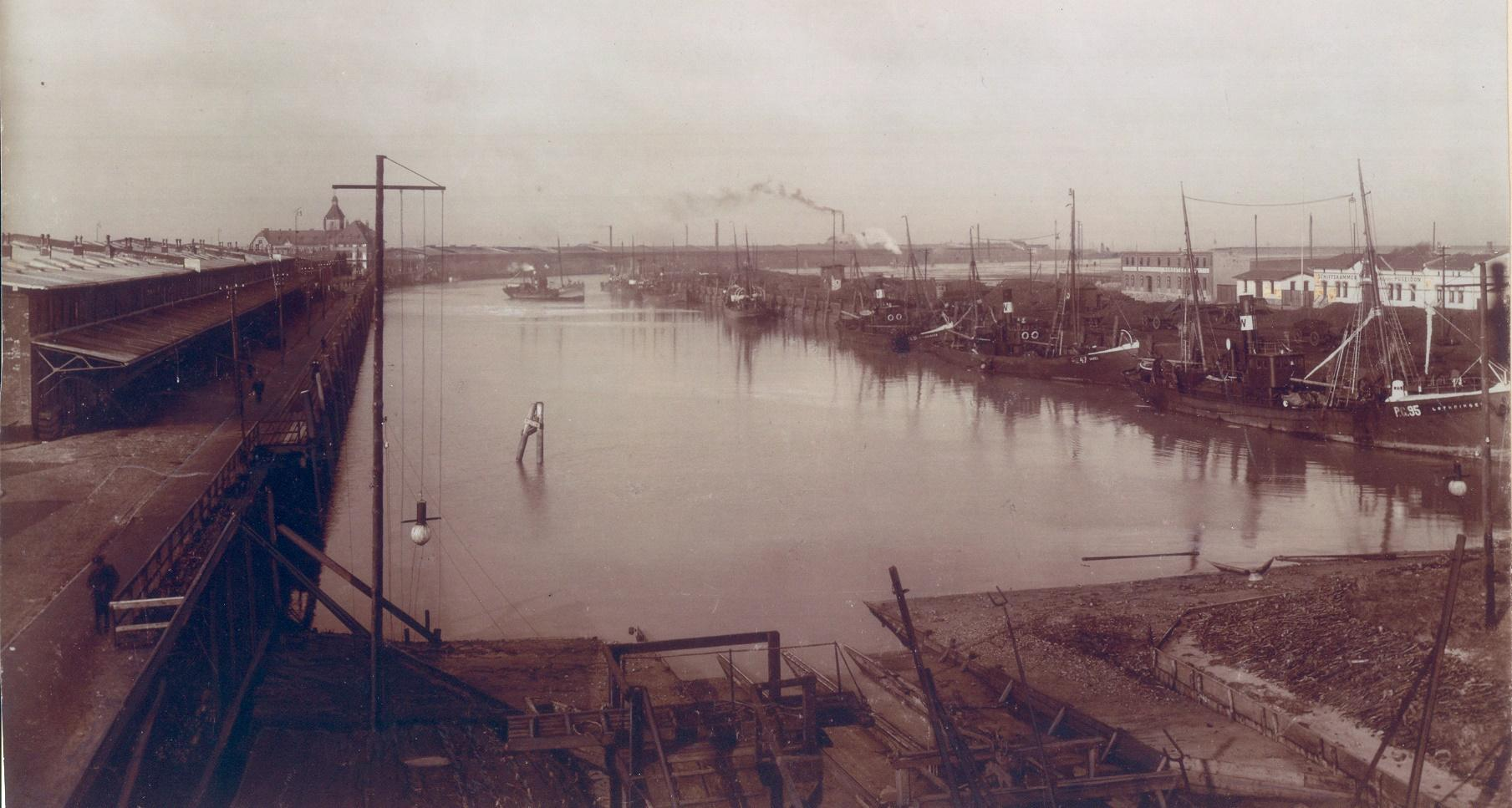 Fotografie des Fischereihafens I in Geestemünde (Bremerhaven). Ganz rechts der 1903 gebaute Fischdampfer "Lothringen"